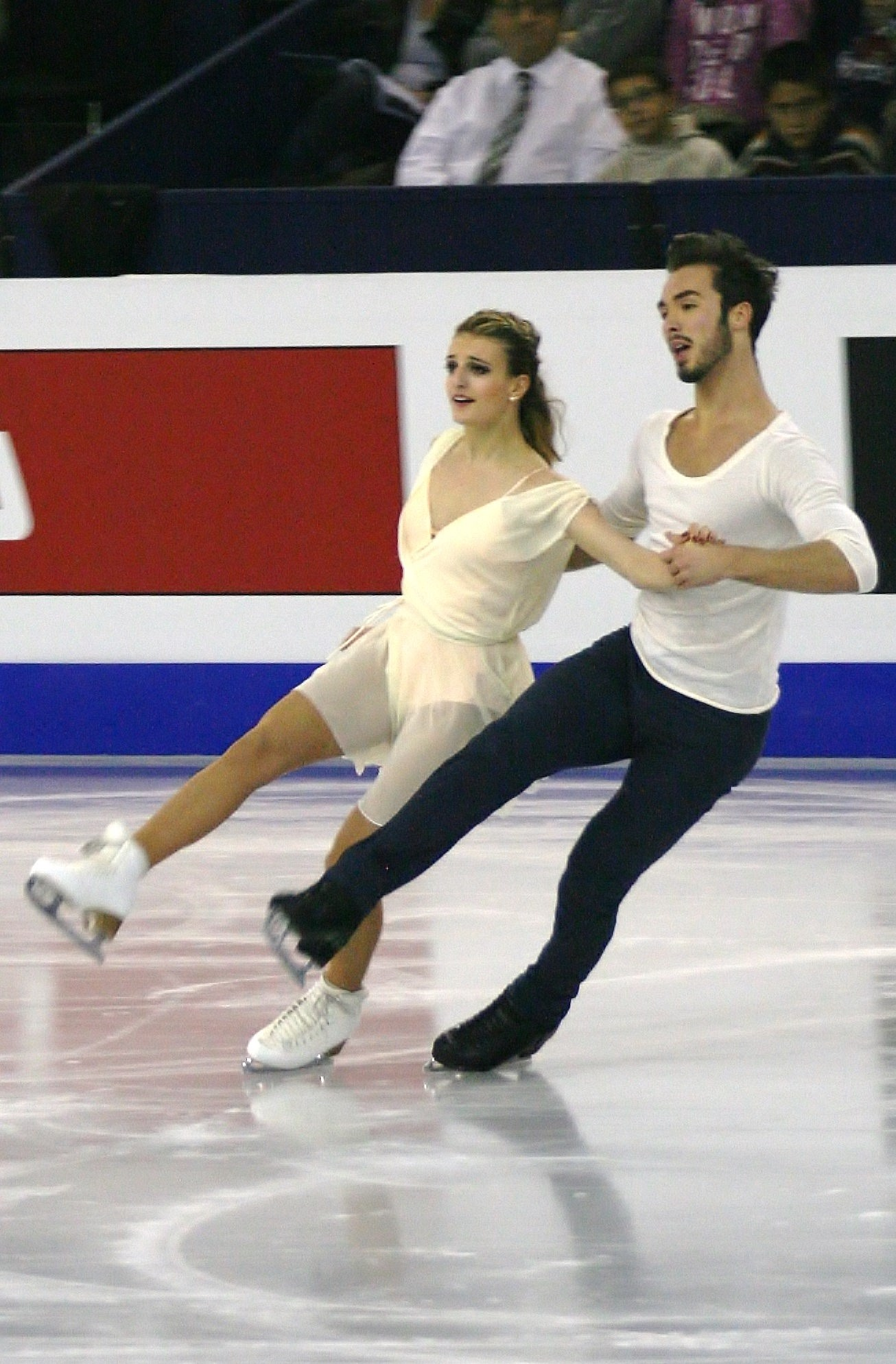 Габриэла Пападакис и Гийом Сизерон (Франция) на финале Гран-при по фигурному катанию 2014-2015.